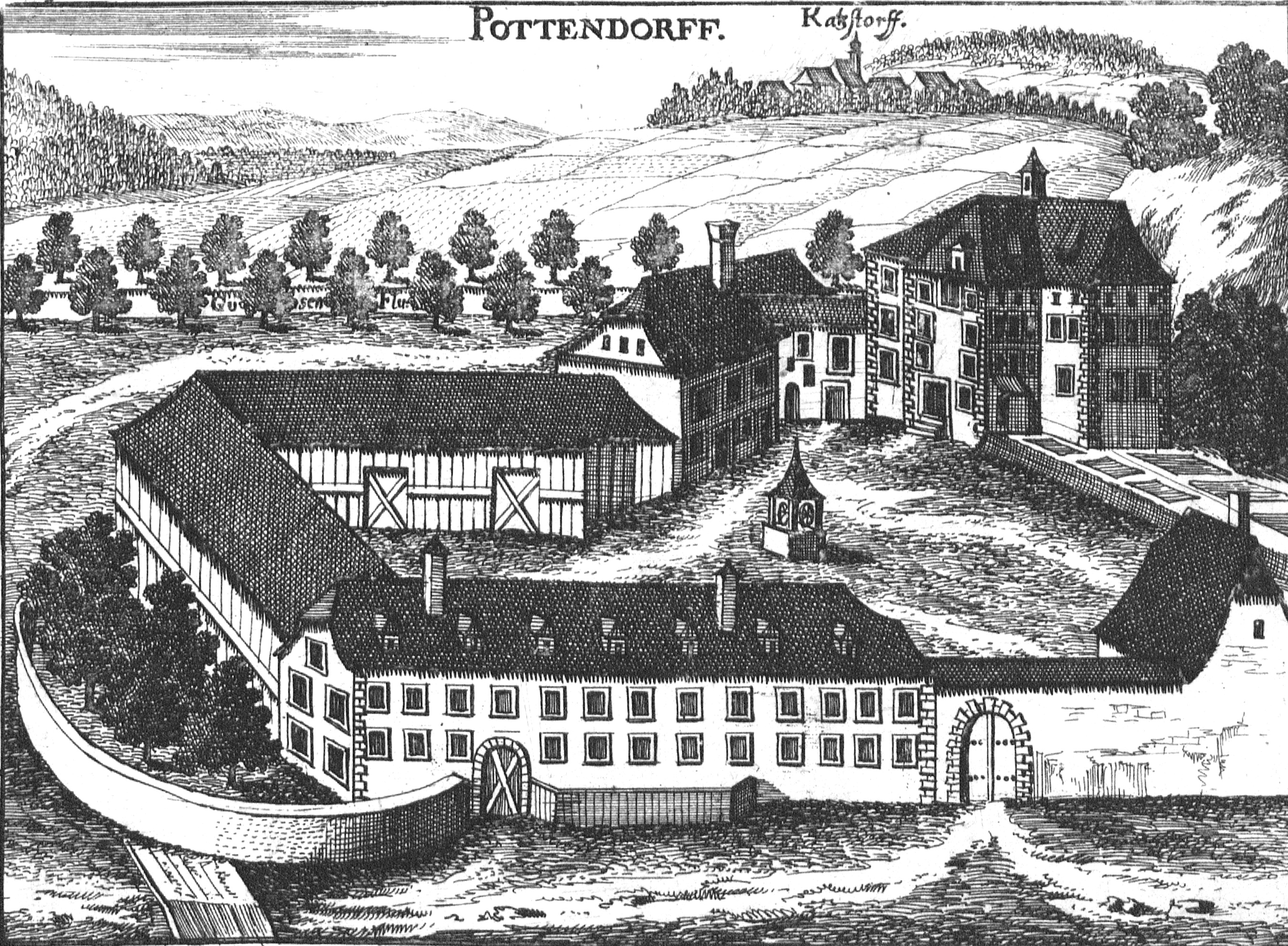 Schloss Bodendorf nach einem Stich von Georg Matthäus Vischer von 1674 Topographia Austriae superioris modernae